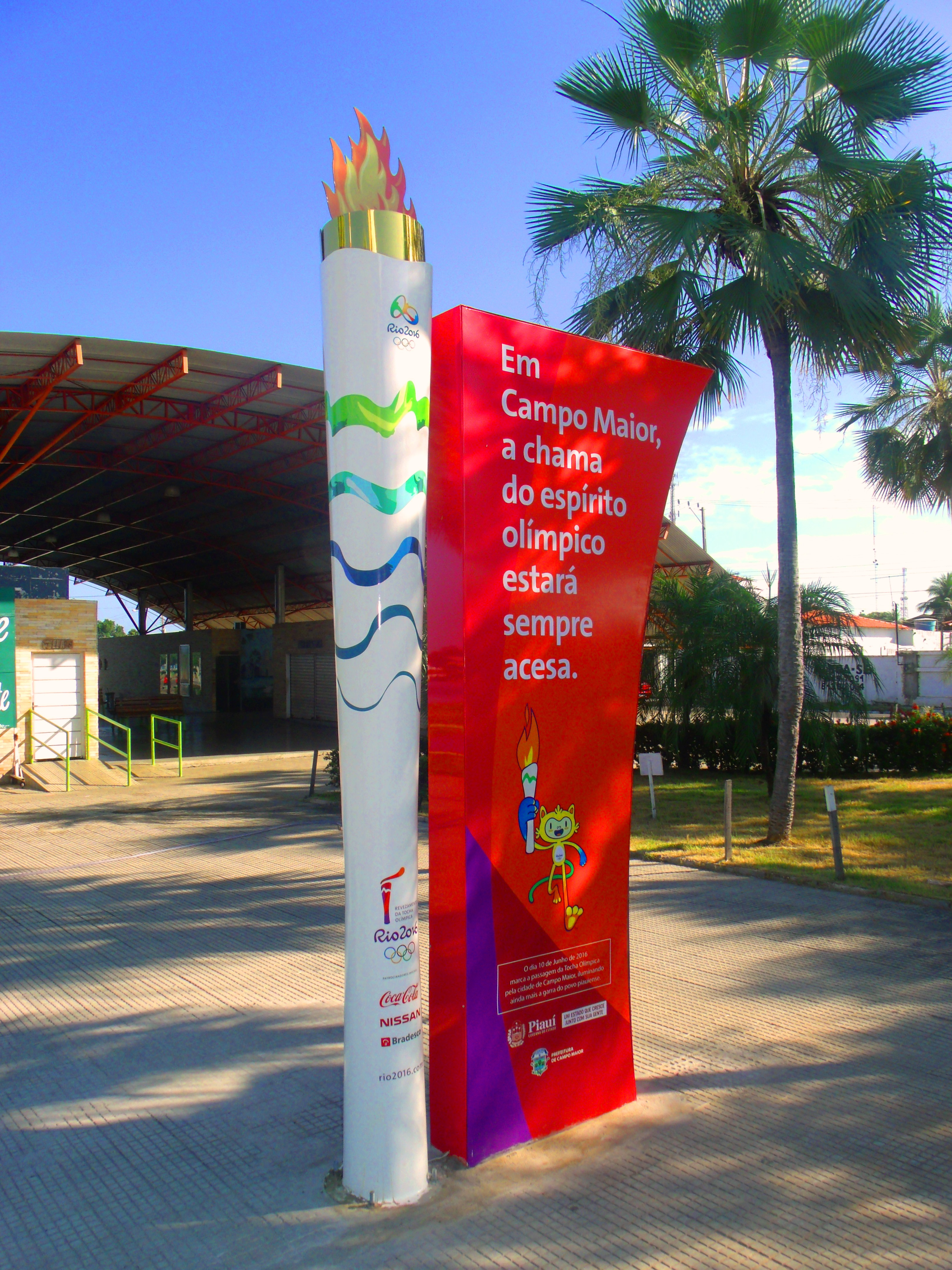 Totem da tocha olímpica em Campo Maior.